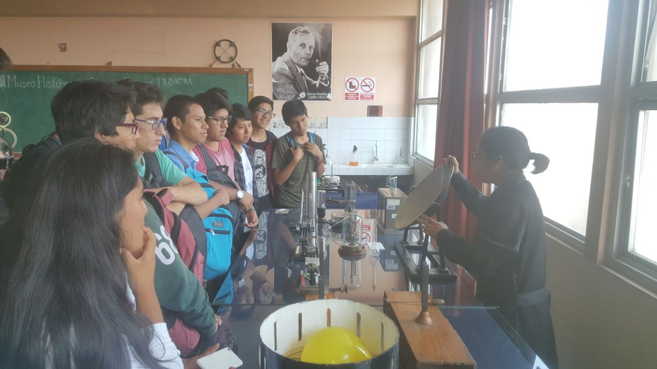 esta foto contiene parte de lo que es el area de mecanica y fluidos del MHCF